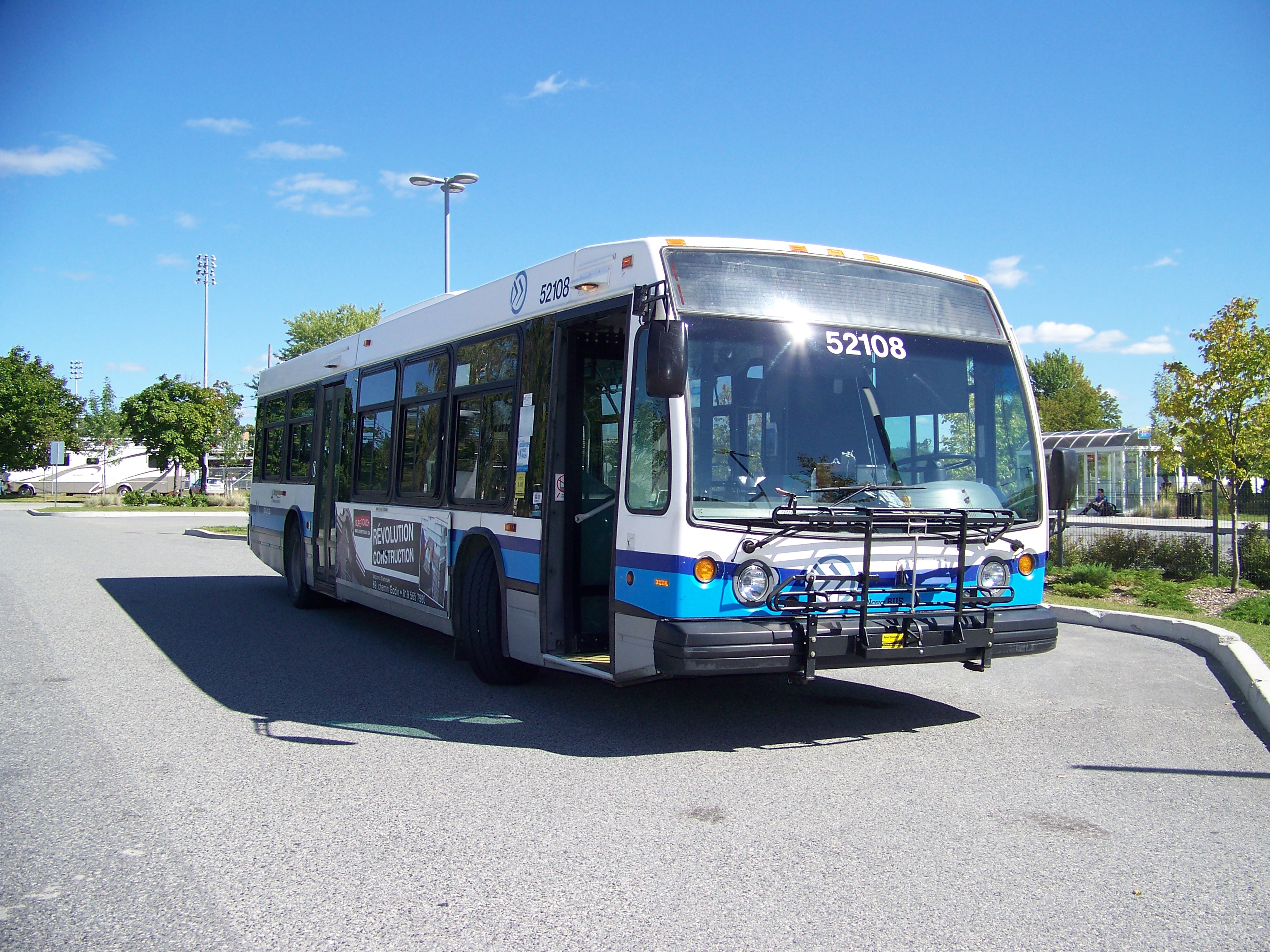 Société de transport de Sherbrooke